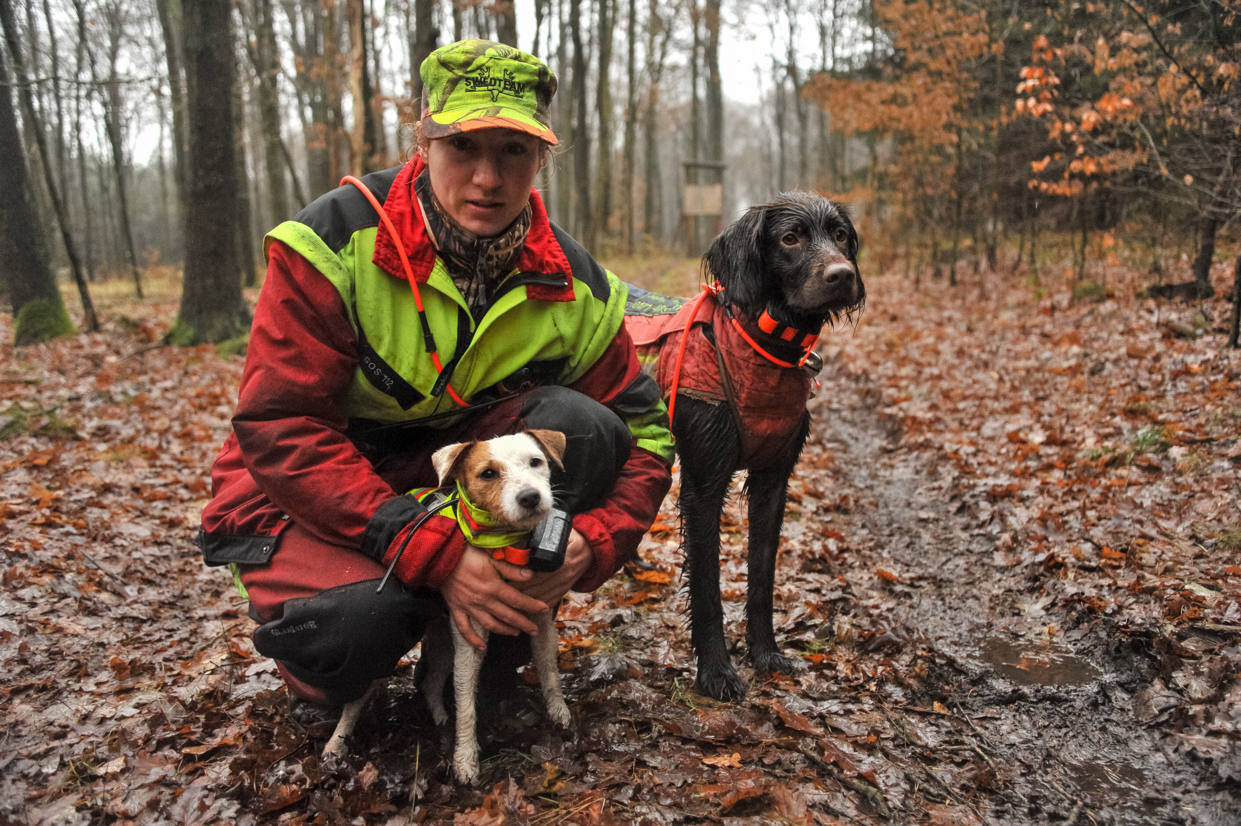 Jägerin und Stöberhunde mit moderner Ausrüstung (Quelle: Mross/DJV)